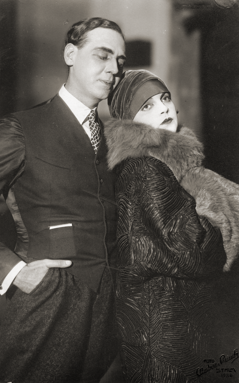 Margit Manstad som Sussi de Lorche och Hugo Björne som Kurt Balzar.